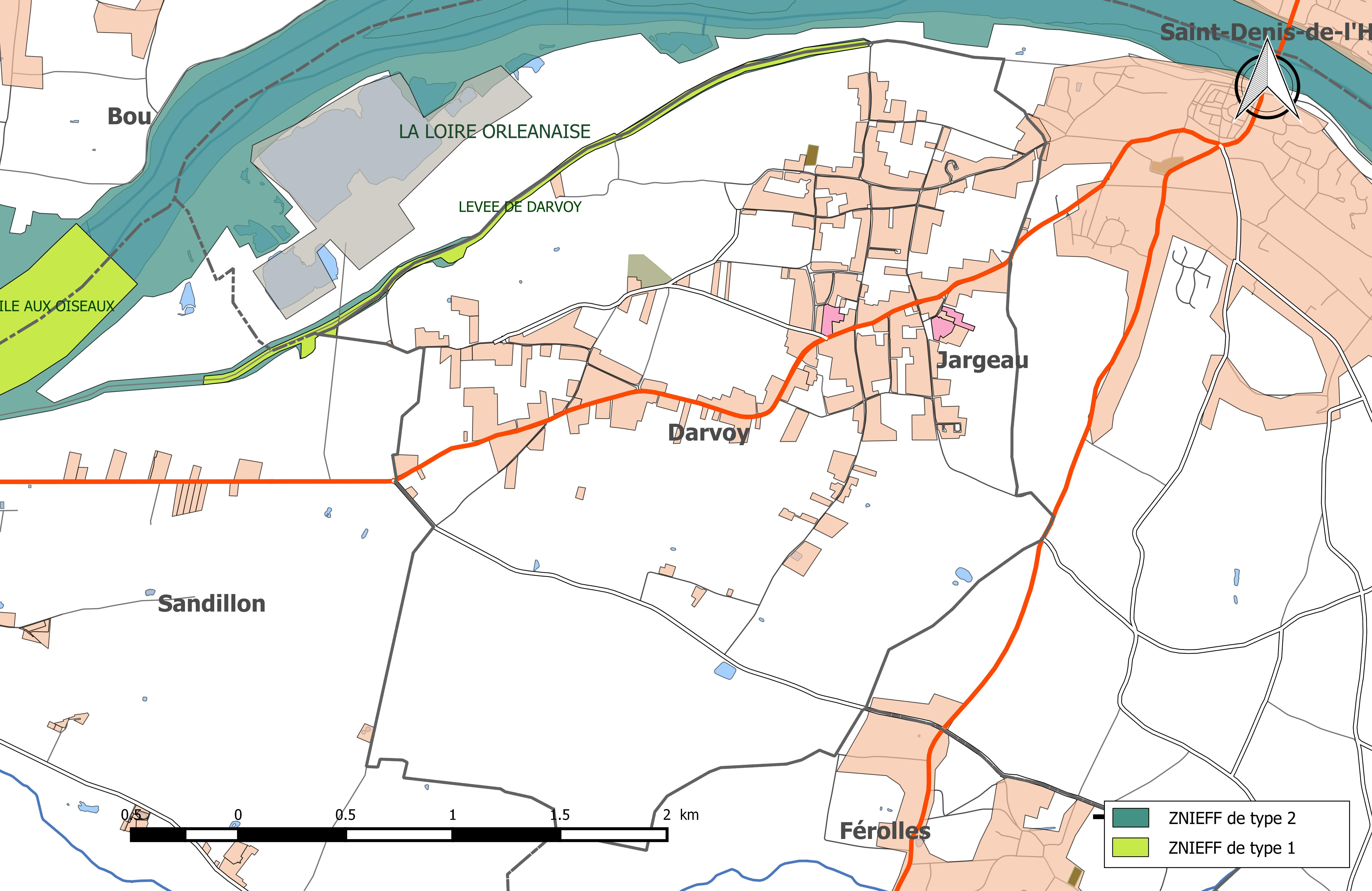 Carte des Zones naturelles d'intérêt écologique faunistique et Floristique (ZNIEFF) de la commune de Darvoy.